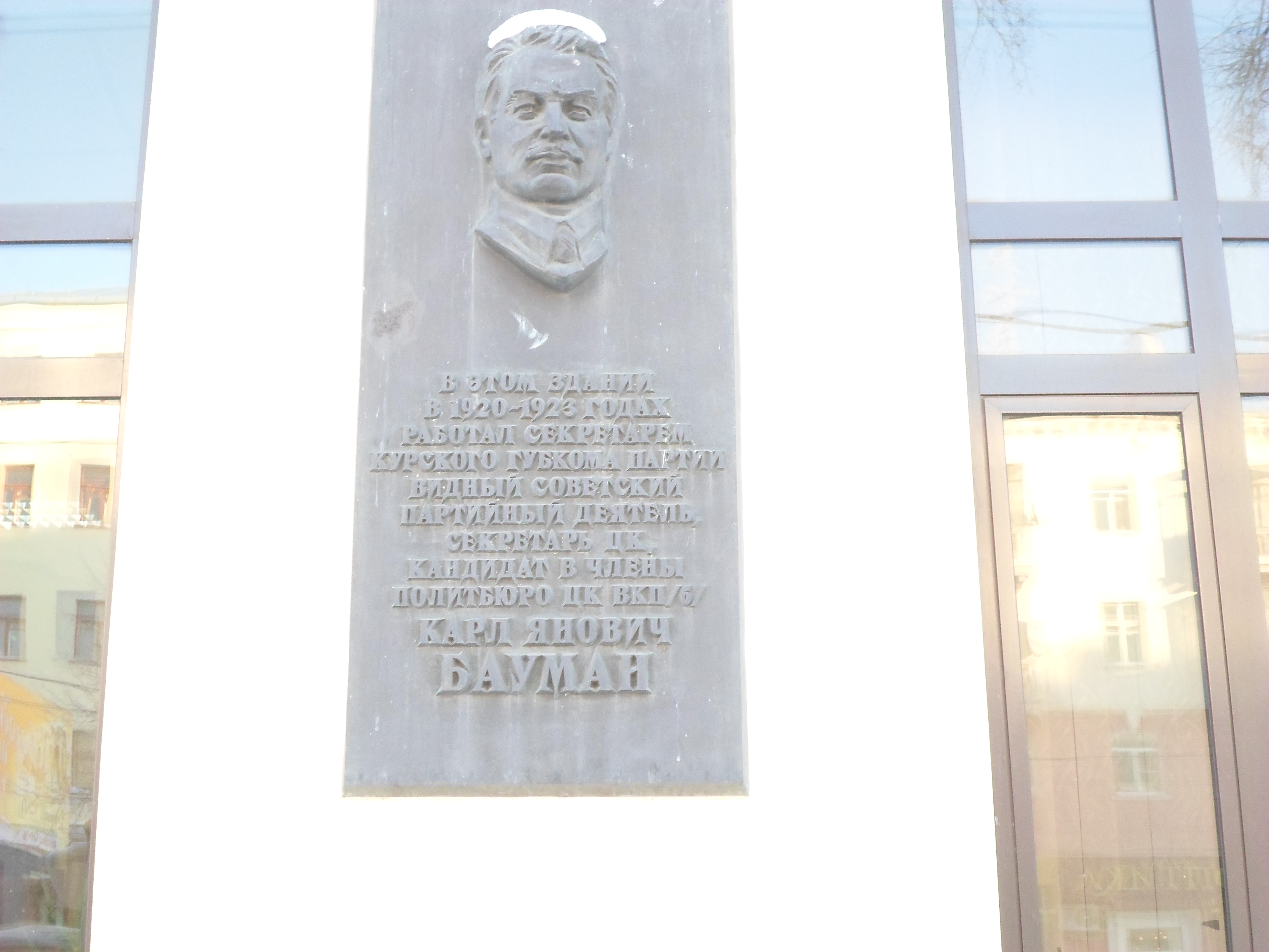 Памятная доска К.Я. Бауману